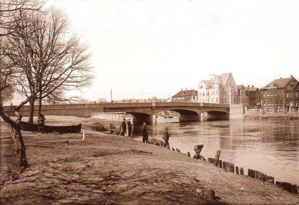 Vana Vabadussild.